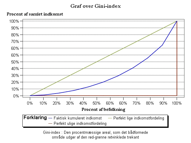 Graf over Giniindex lavet i SAS